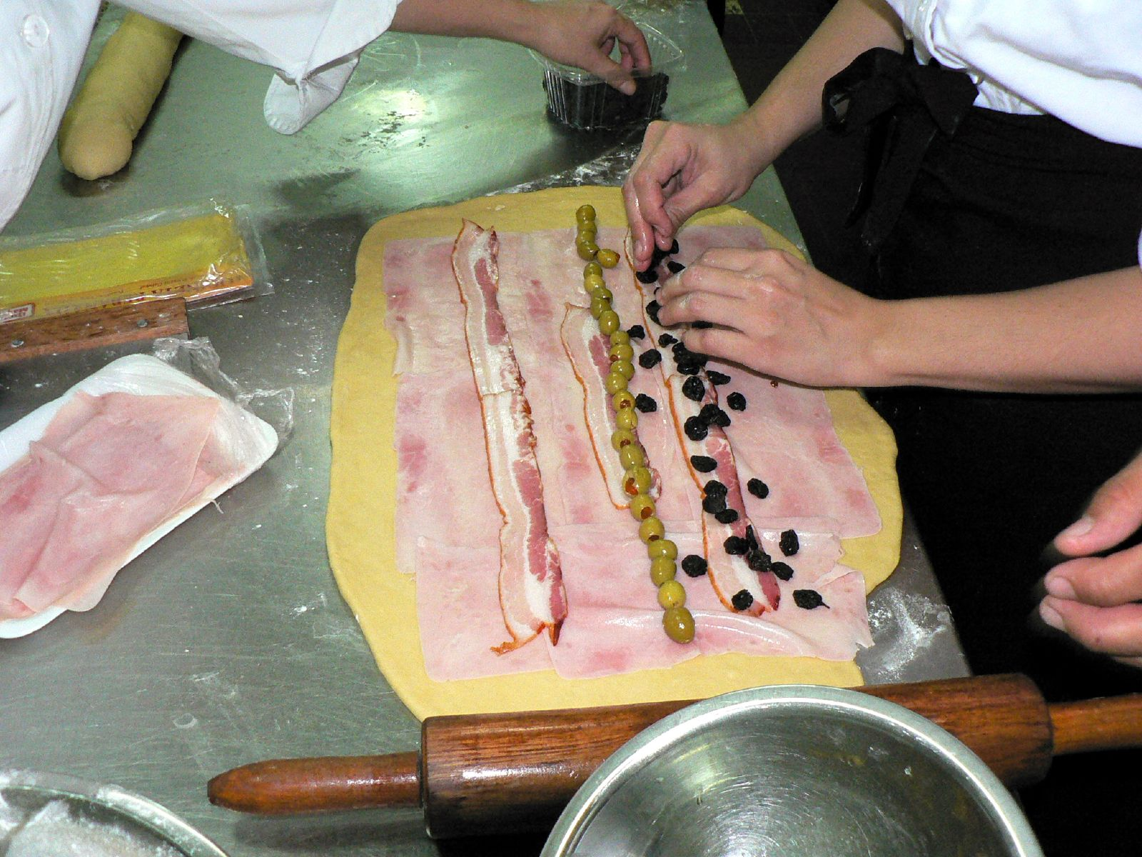 Relleno del Pan de Jamón por Clara